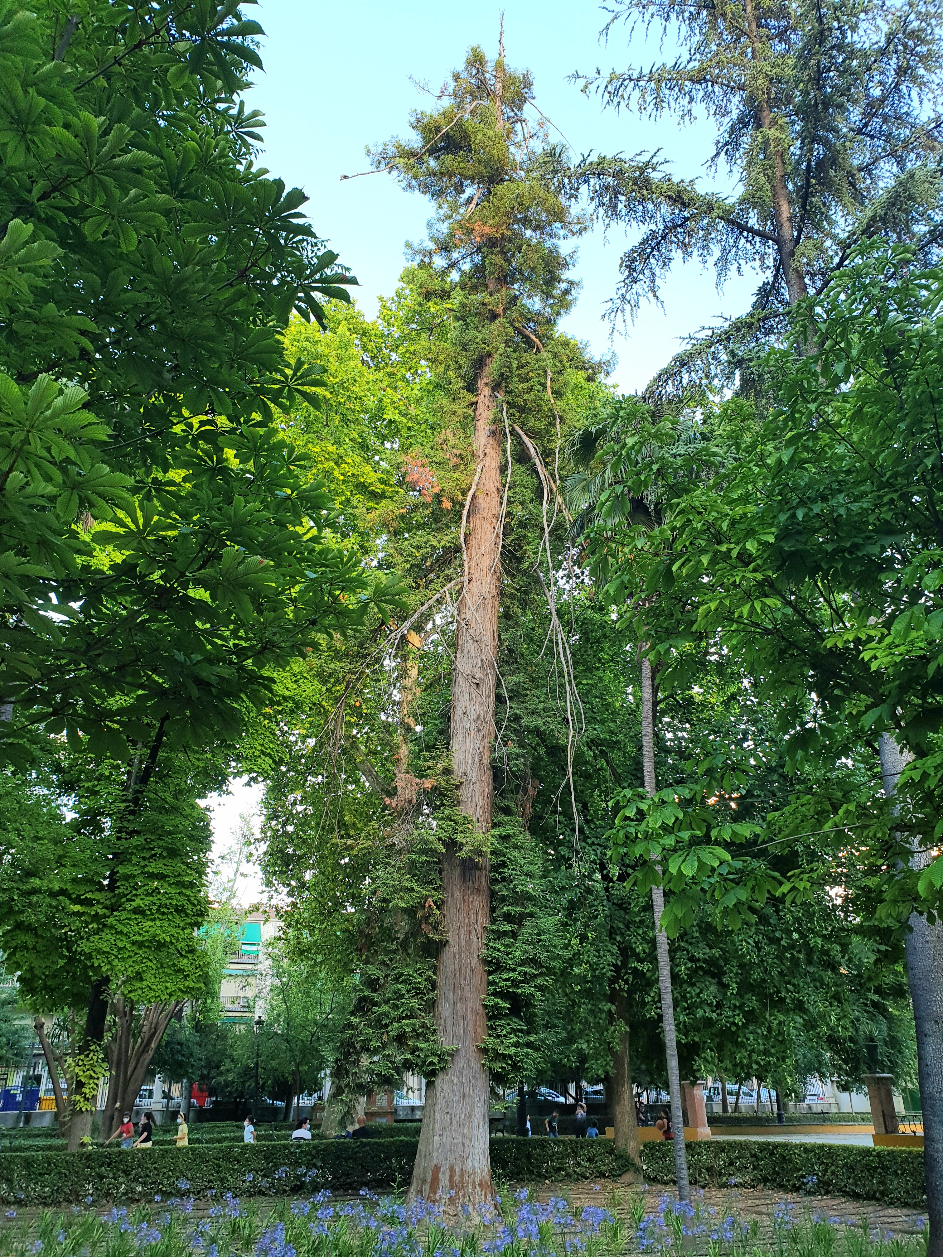 Secuoya de parque Alcántara Romero de Cabra